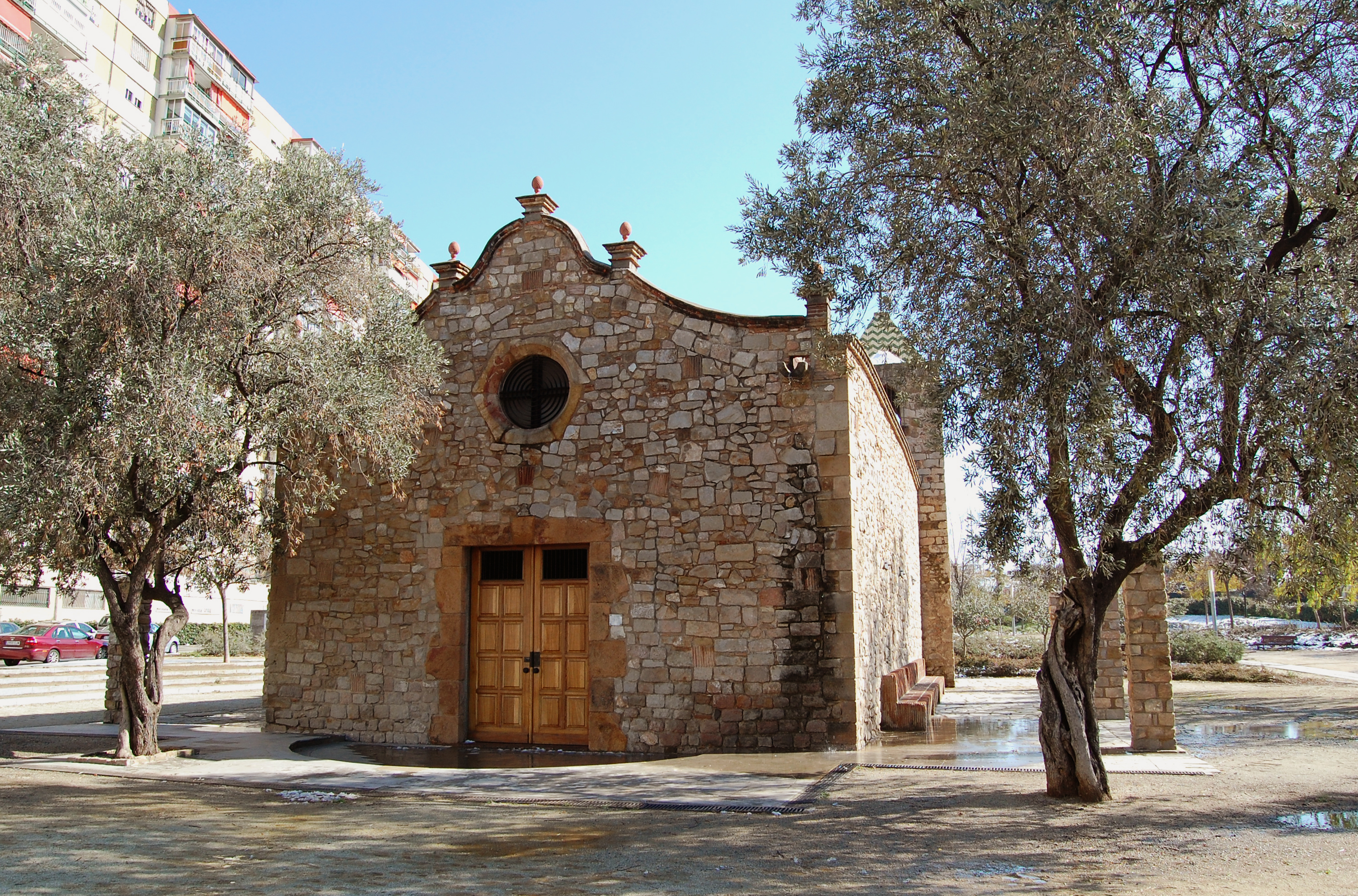 Aspecto de la Ermita de Bellvitge tras la nevada de Marzo de 2010.